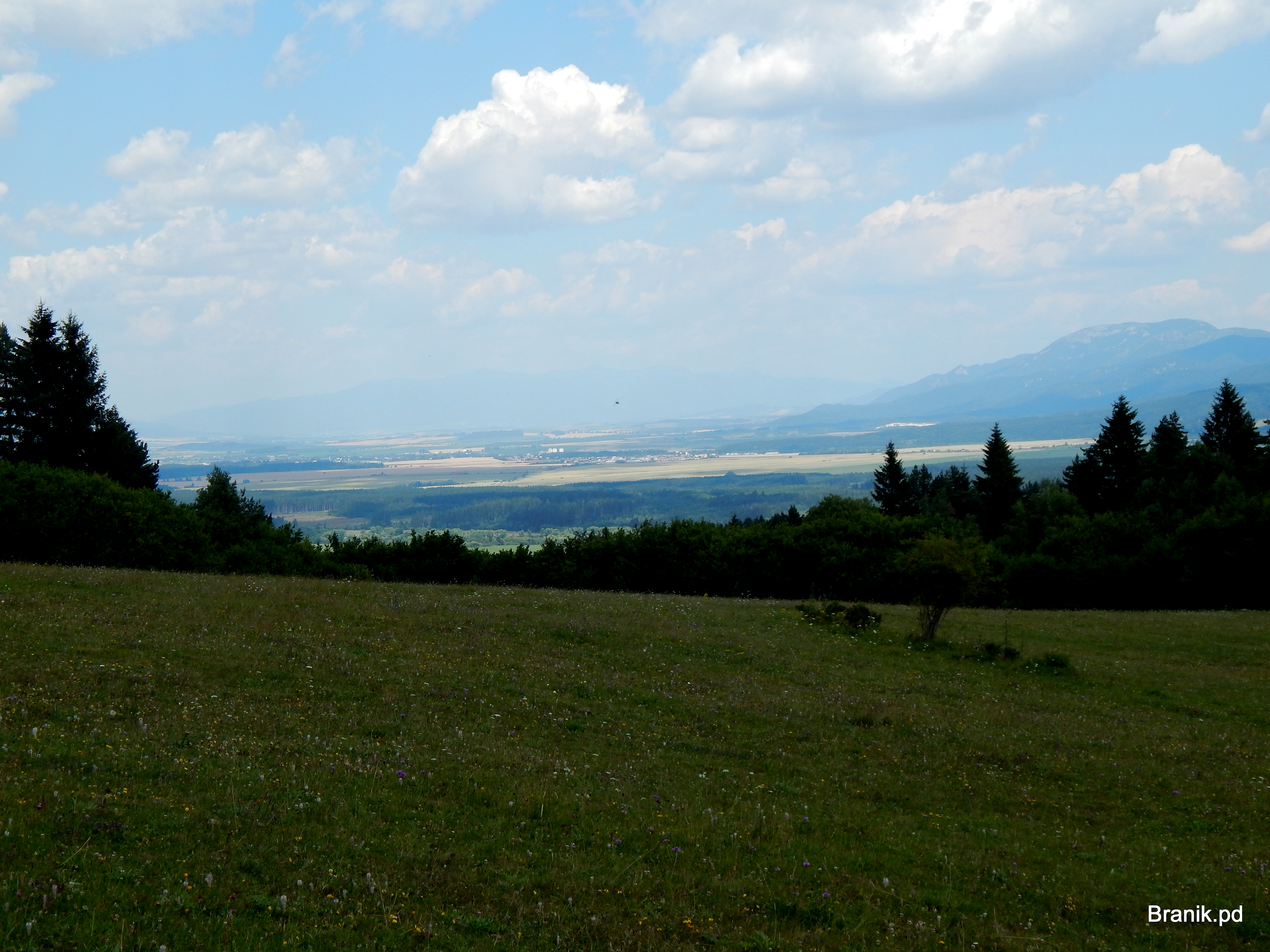 Sklené, Slovakia